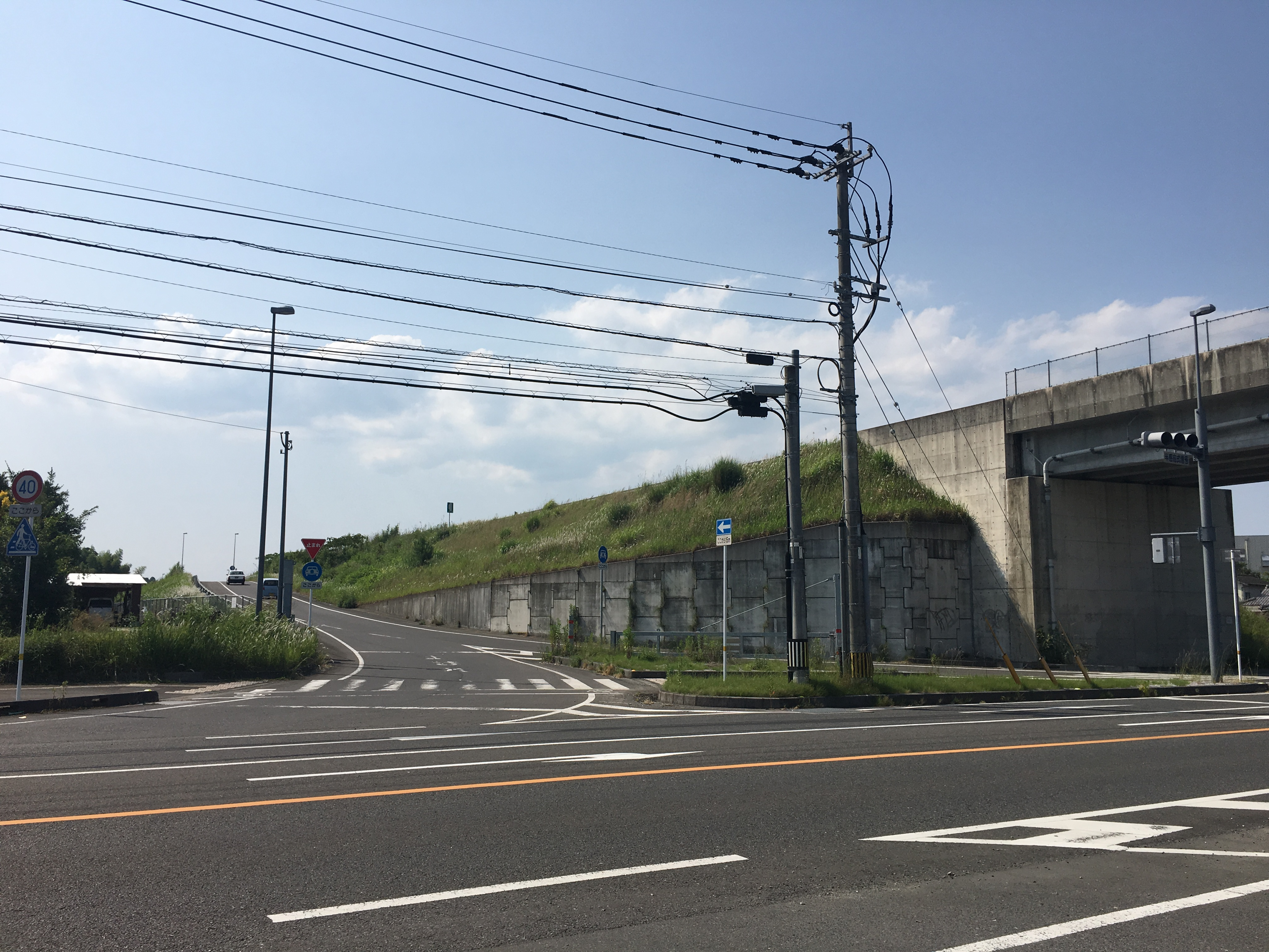 今町インターチェンジの都城方面インランプ。